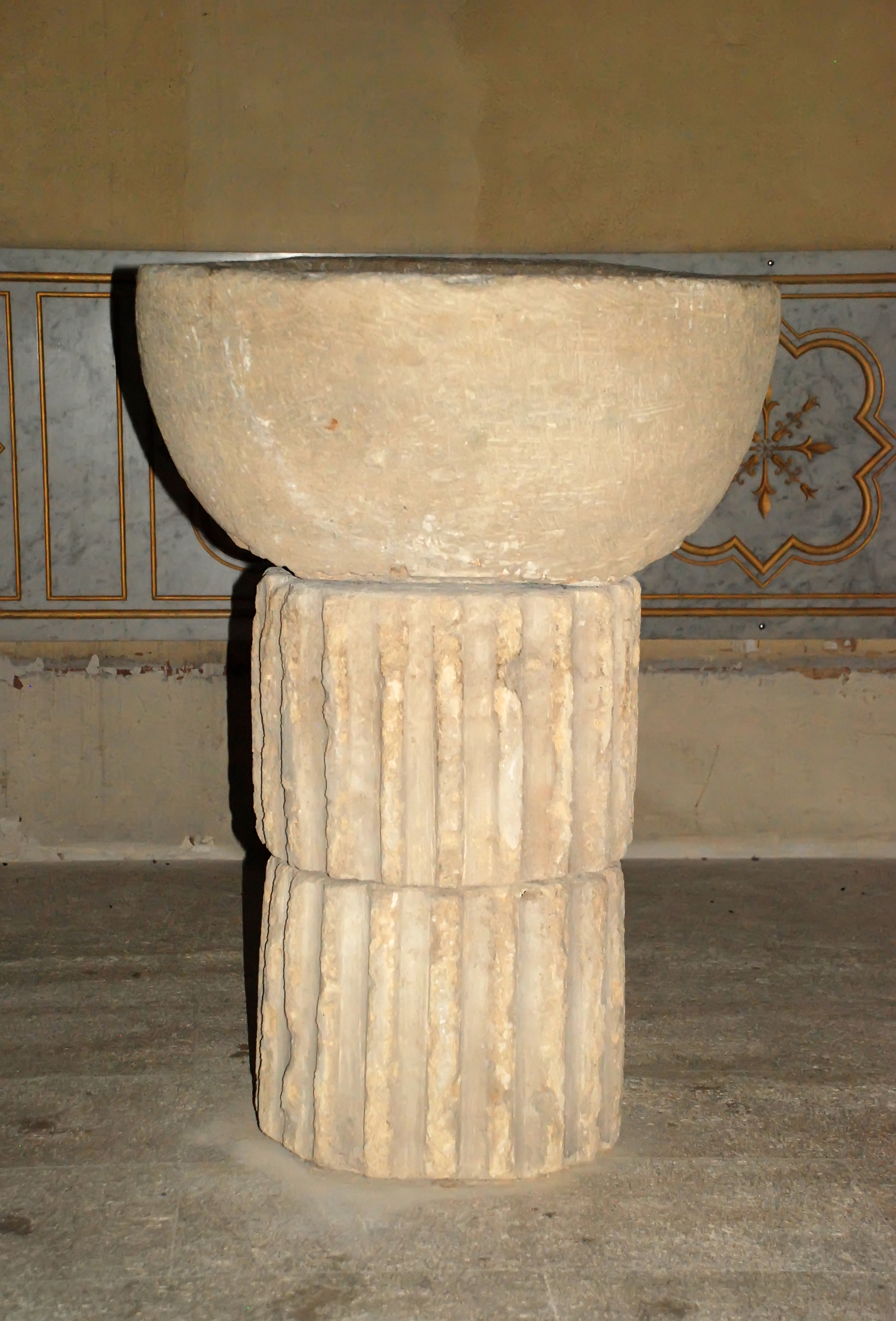 France - Gard - Église Saint-Saturnin de Calvisson